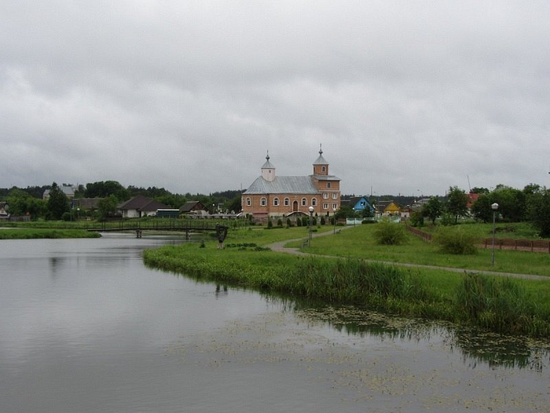 Астравец. Петрапаўлаўская царква